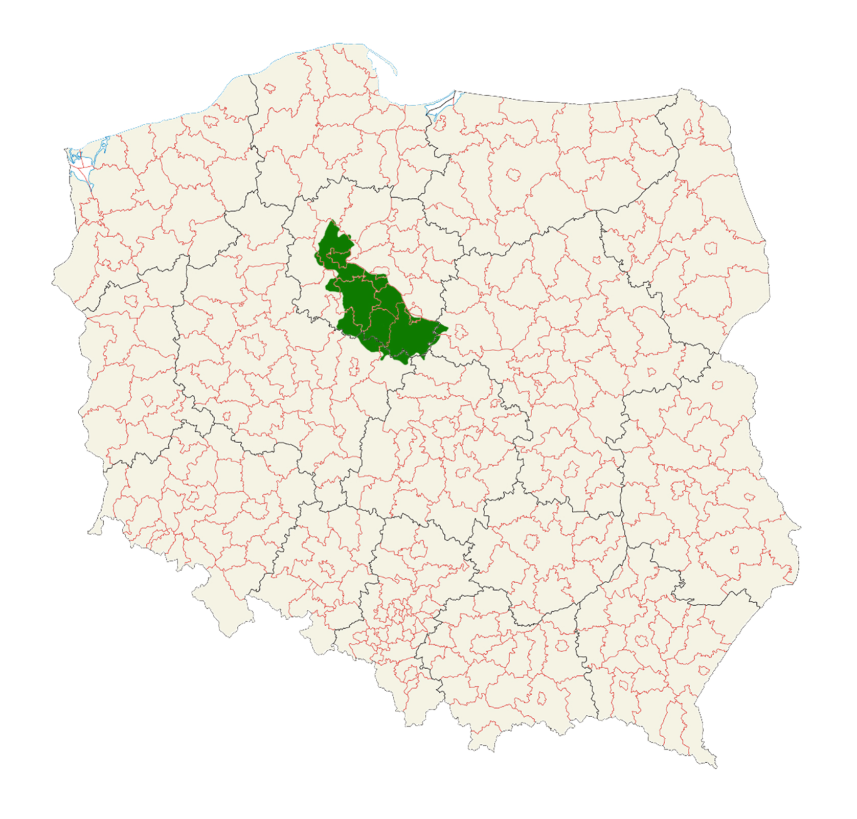 Położenie Kujaw na mapie Polski.